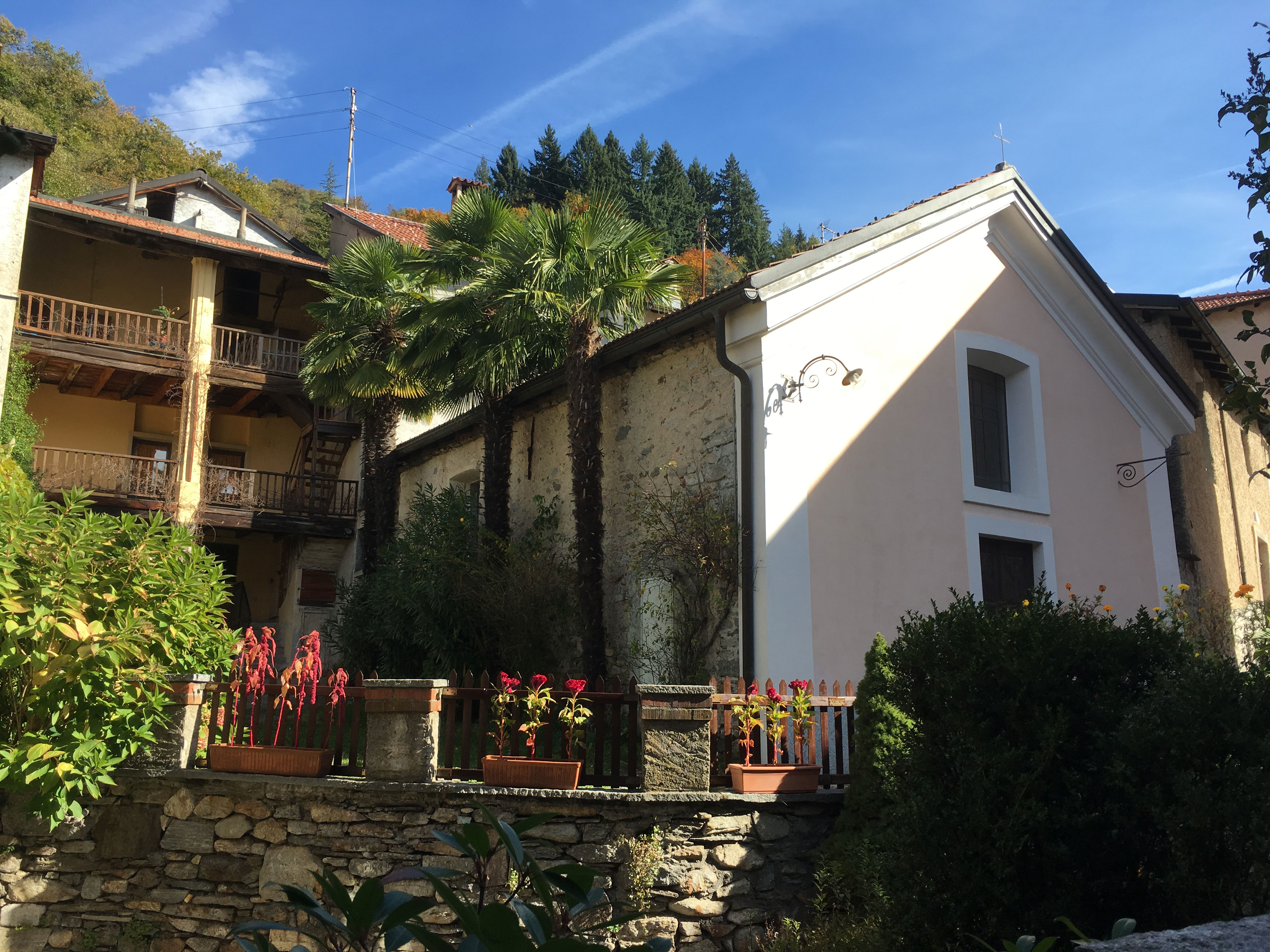 Umgebung der Kapelle Sant’Antonio Abate an der ara Piazzéta da Sant'Antòni in Astano.